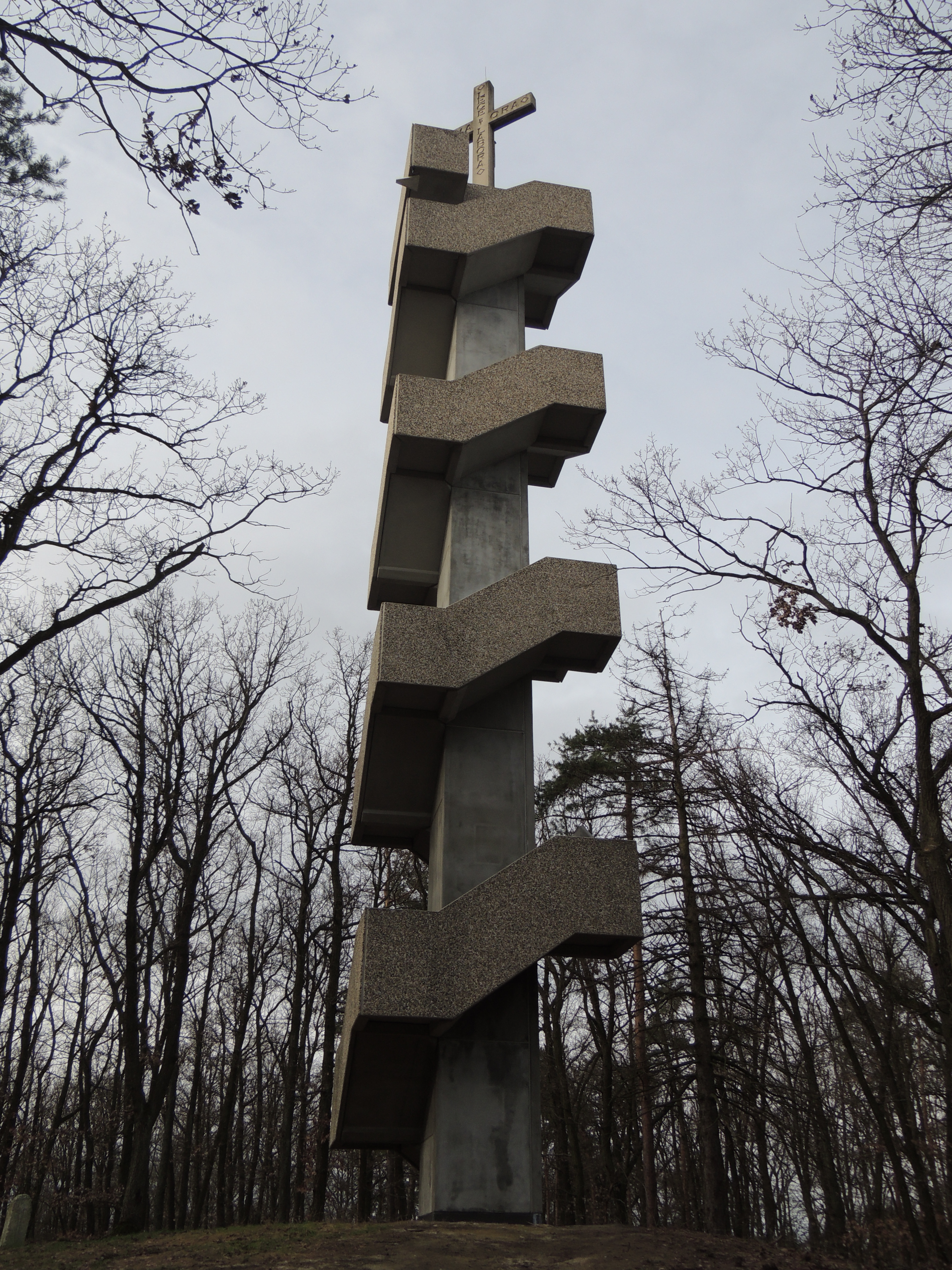 Die 26m hohe Europawarte bei Waitzendorf, Bezirk Hollabrunn, nach der Sanierung im Herbst 2018